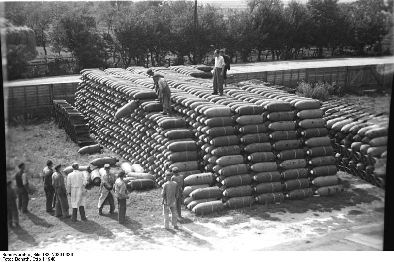 ADN-ZB/Donath In einem Betrieb in Mehderitzsch bei Torgau, der Massenbedarfsgüter produziert, werden aus dem Stahlblech von Bombenhülsen Eimer, Kochtöpfe, Spaten und Schaufeln hergestellt. Aufn. 1948 Information added by Wikimedia users. vermutlich SC 250 Bombenhülsen mit ca. 200 kg